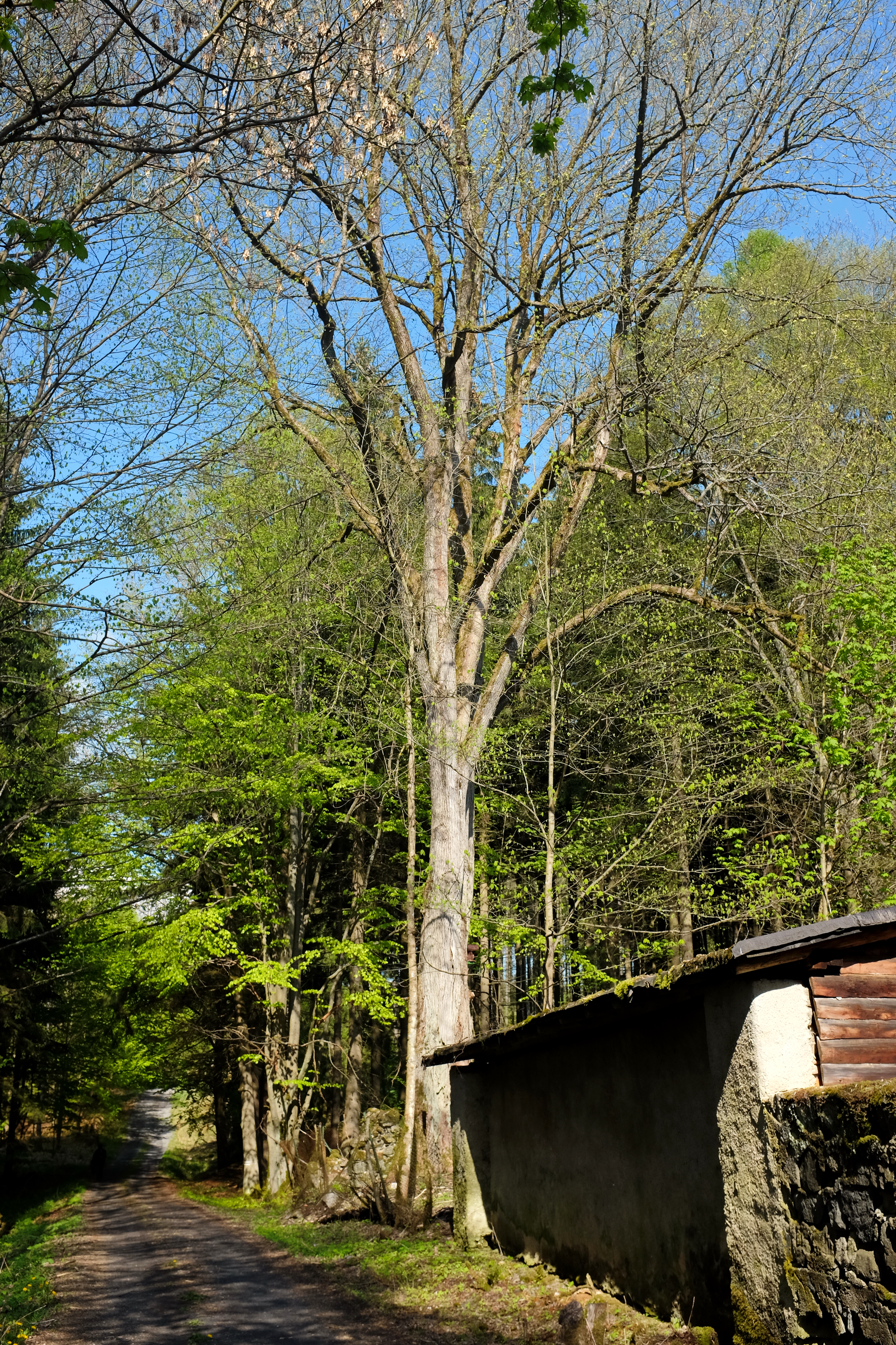 Památný strom - Jilm u Hvězdy - Slavkovský les, obec Valy, okres Cheb